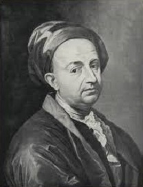 Autoritratto, olio su tela, Pinacoteca di Brera, Milano